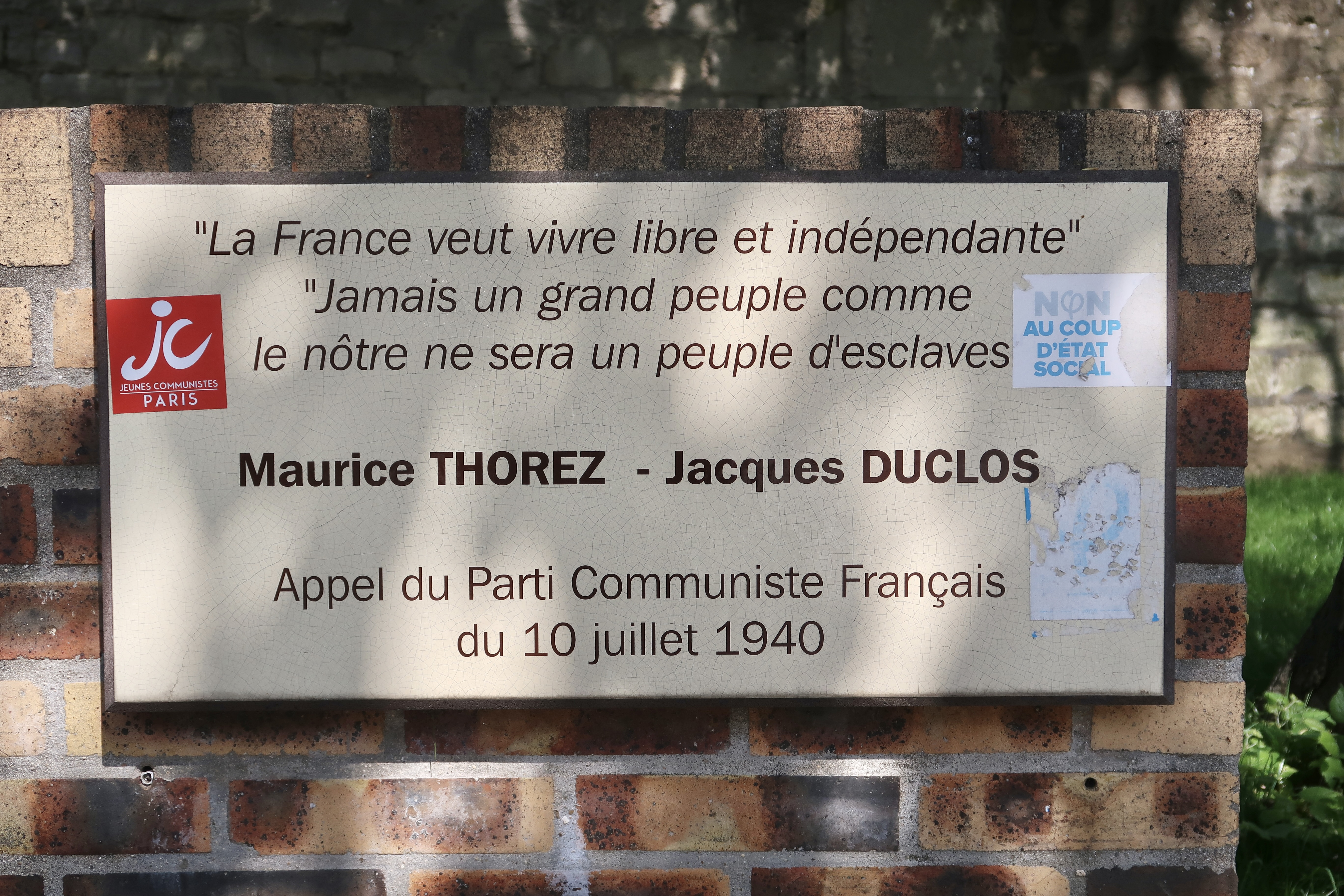 Plaque en hommage à Maurice Thorez et Jacques Duclos, au croisement entre le boulevard Maurice-Thorez et l'avenue Pierre-Sernard à Bobigny, (Seine-Saint-Denis).